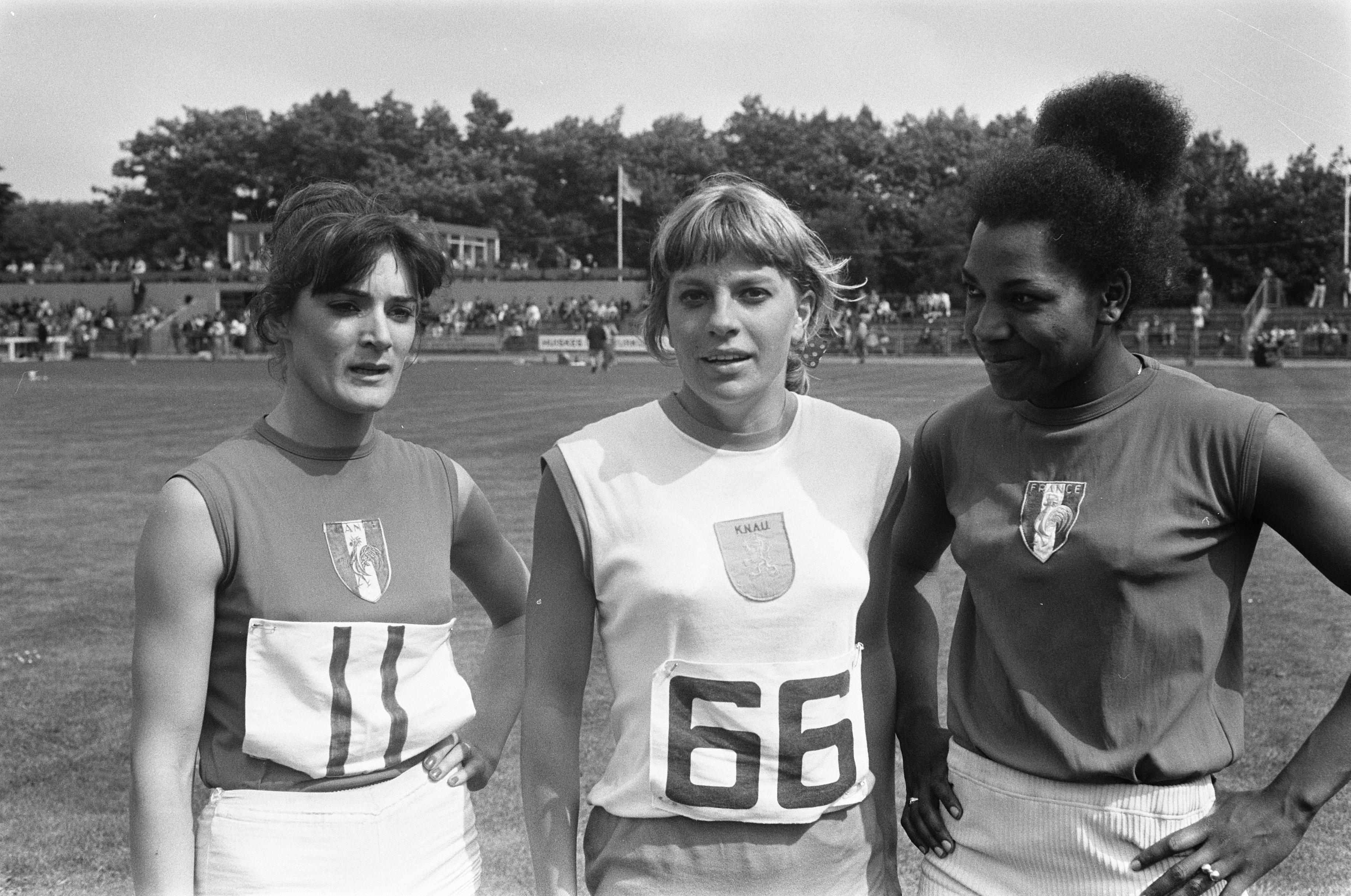 Collectie / Archief : Fotocollectie Anefo Reportage / Serie : Dames atletiek-interland Frankrijk-Nederland-Zweden in Uden Beschrijving : V.l.n.r. Jeanne Schoebel, Mieke Sterk en Marlene Caugino Datum : 13 juli 1969 Locatie : Noord-Brabant, Uden Trefwoorden : atletiek, sport Persoonsnaam : Caugino, Marlene, Schoebel, Jeanne, Sterk, Mieke Fotograaf : Fotograaf Onbekend / Anefo Auteursrechthebbende : Nationaal Archief Materiaalsoort : Negatief (zwart/wit) Nummer archiefinventaris : bekijk toegang 2.24.01.05 Bestanddeelnummer : 922-6239